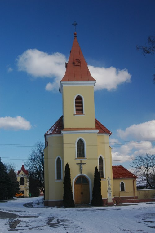 Kátov, church